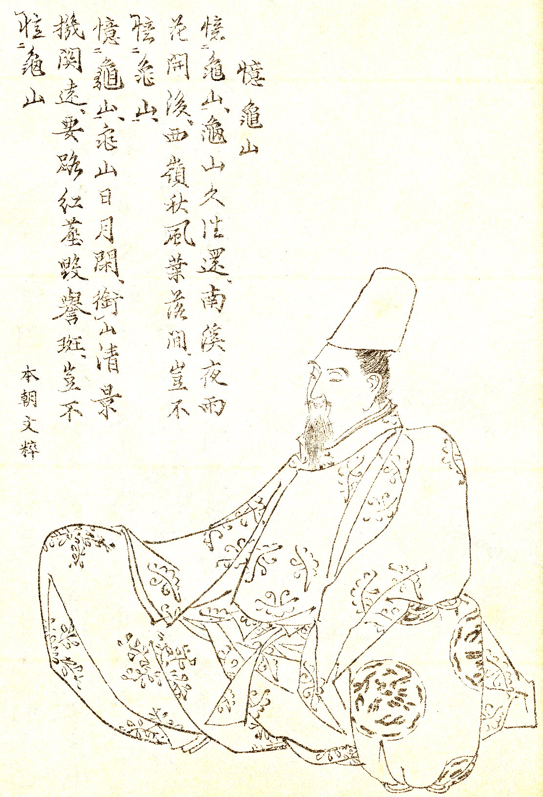 兼明親王 / Prince Kakeakira (914–987)